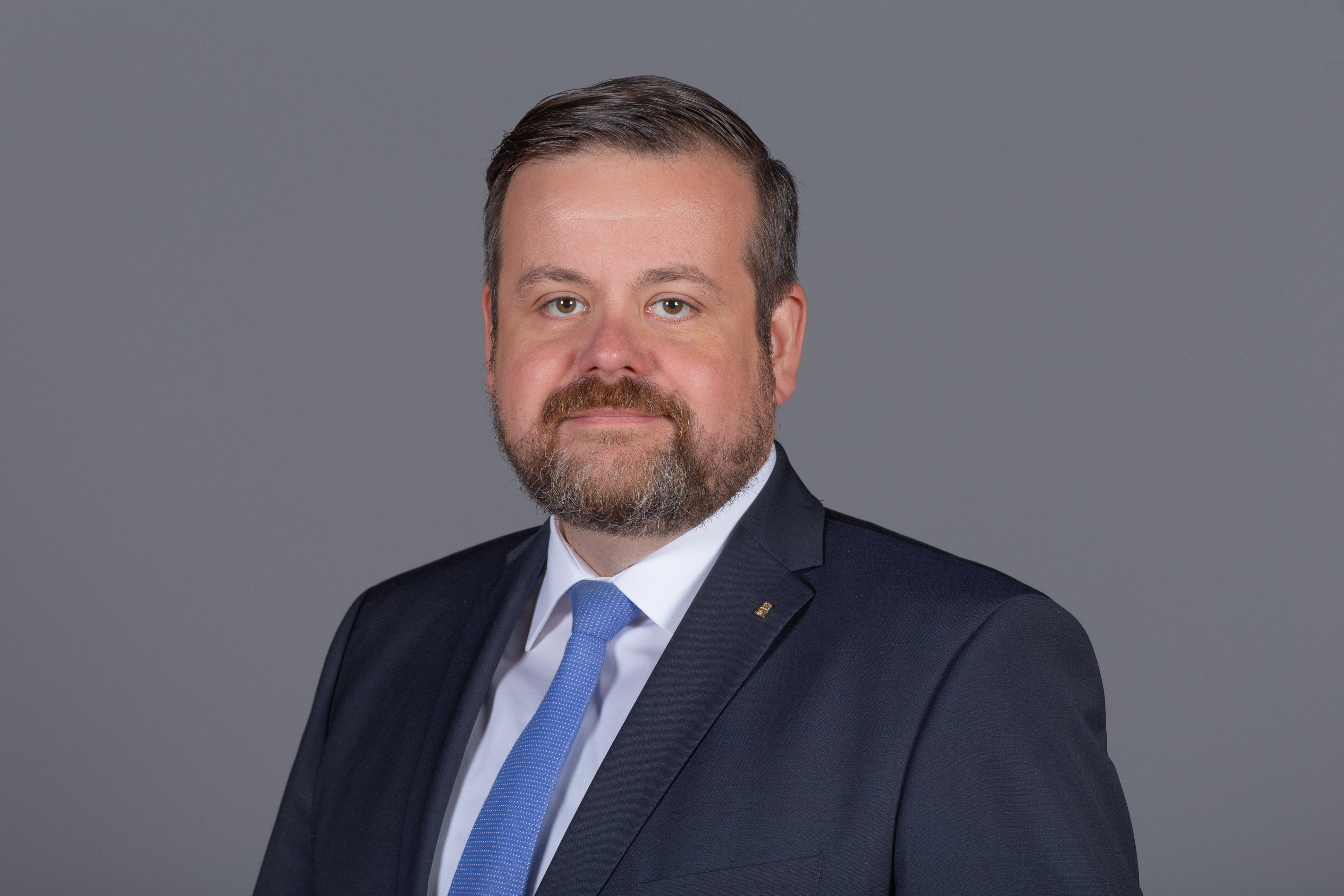 Abgeordnete(r) der Bürgerschaft der Freien und Hansestadt Hamburg André Trepoll